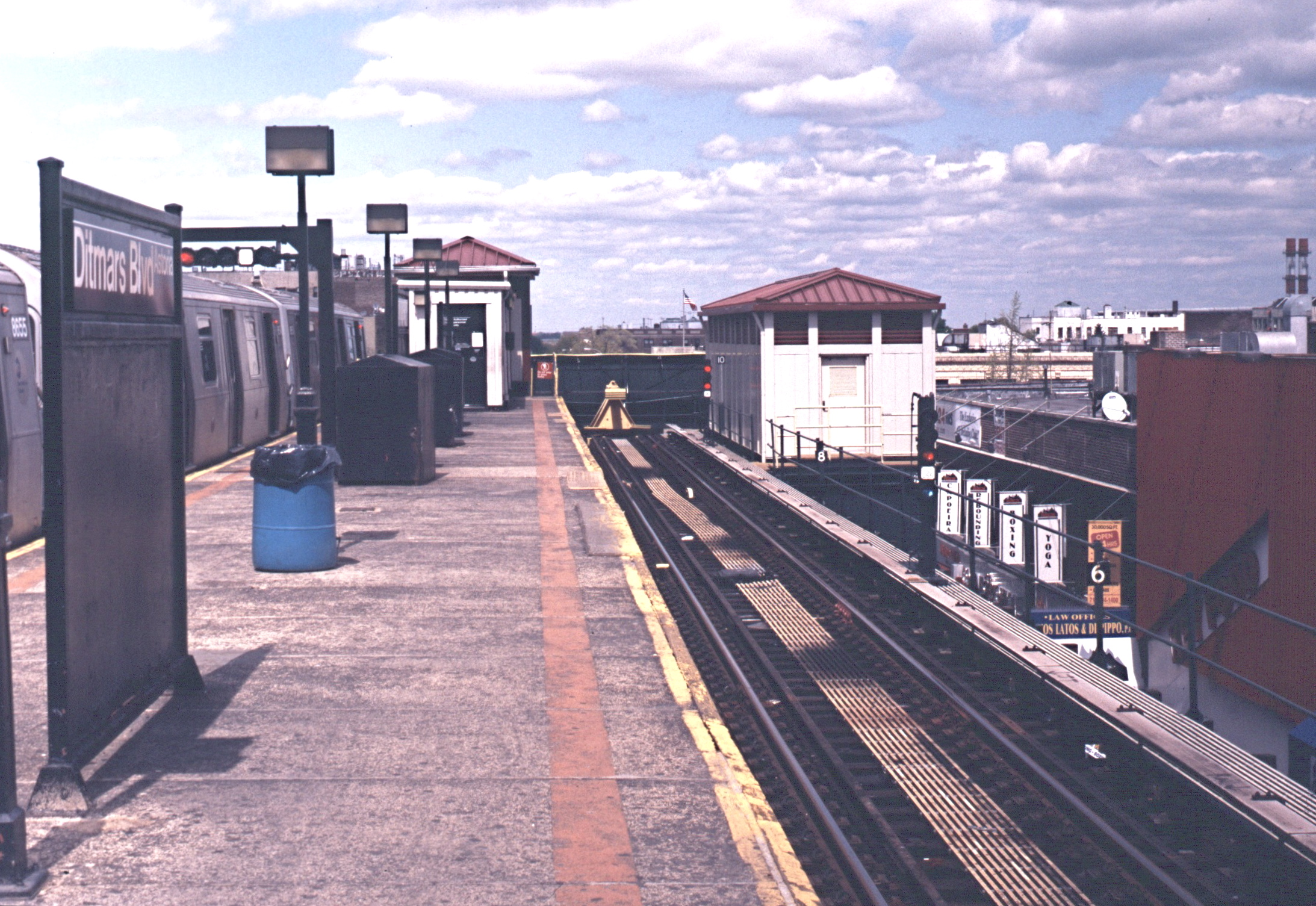 Endstation Ditmars Boulevard der New Yorker U-Bahn-Linie N